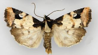 Bryolymnia poasia male